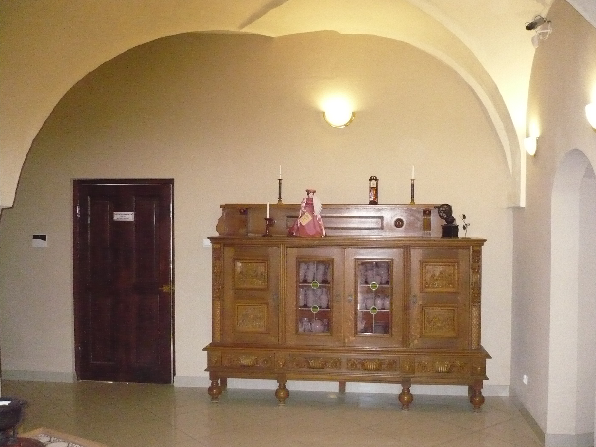 Nowa Ruda, ul. Kościelna 30 - Dwór Górny, obecnie hotel, XVII, XIX w. (zabytek nr A/940/652/WŁ z 25.05.1977)